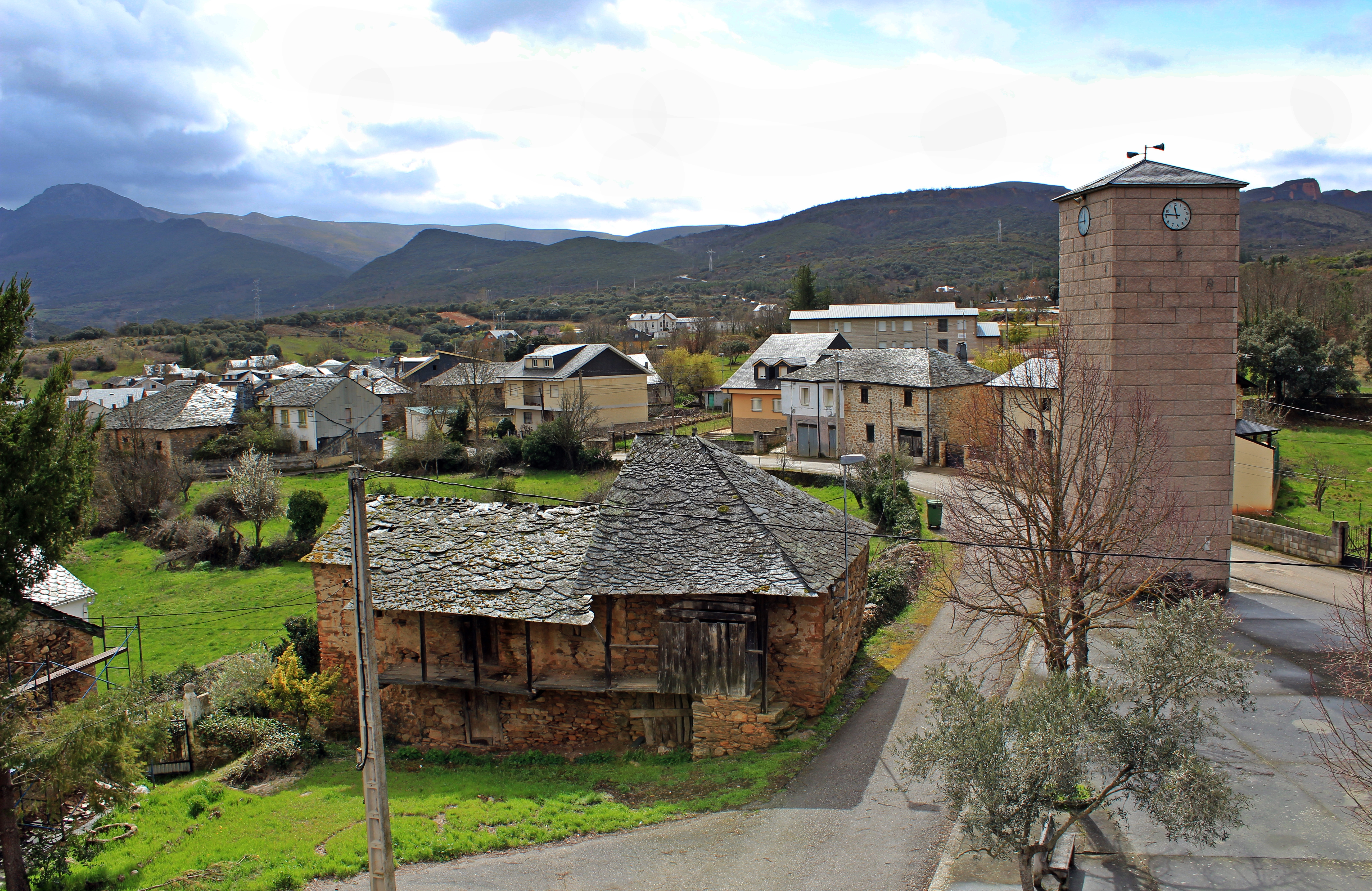 Vista de Carucedo desde la Iglesia, provincia de León, comarca de El Bierzo.